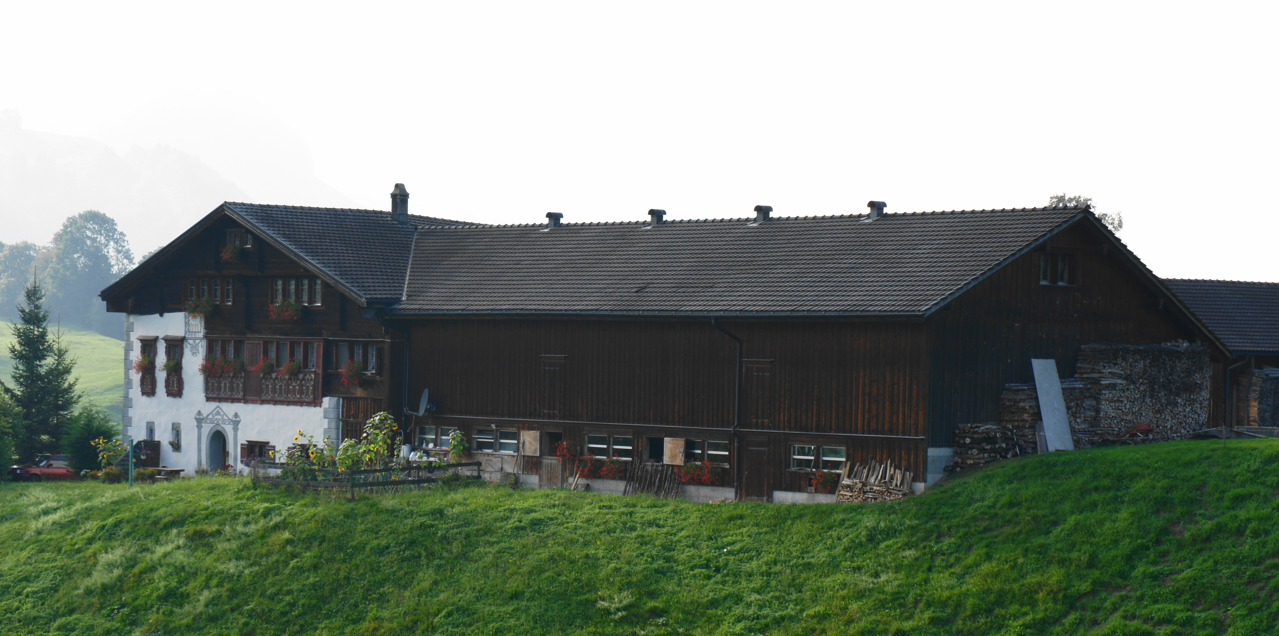 Das Bauernhaus Ulrichlis von Süden gesehen, der untere und westliche Teil des Hauses ist gemauert und mit Ornamenten verziert, der restliche Teil ist eine Holzkonstruktion, rechts ist ein Stall angebaut, nördlich davon steht eine Scheune freistehend, dieses Haus steht im Weiler Lank.